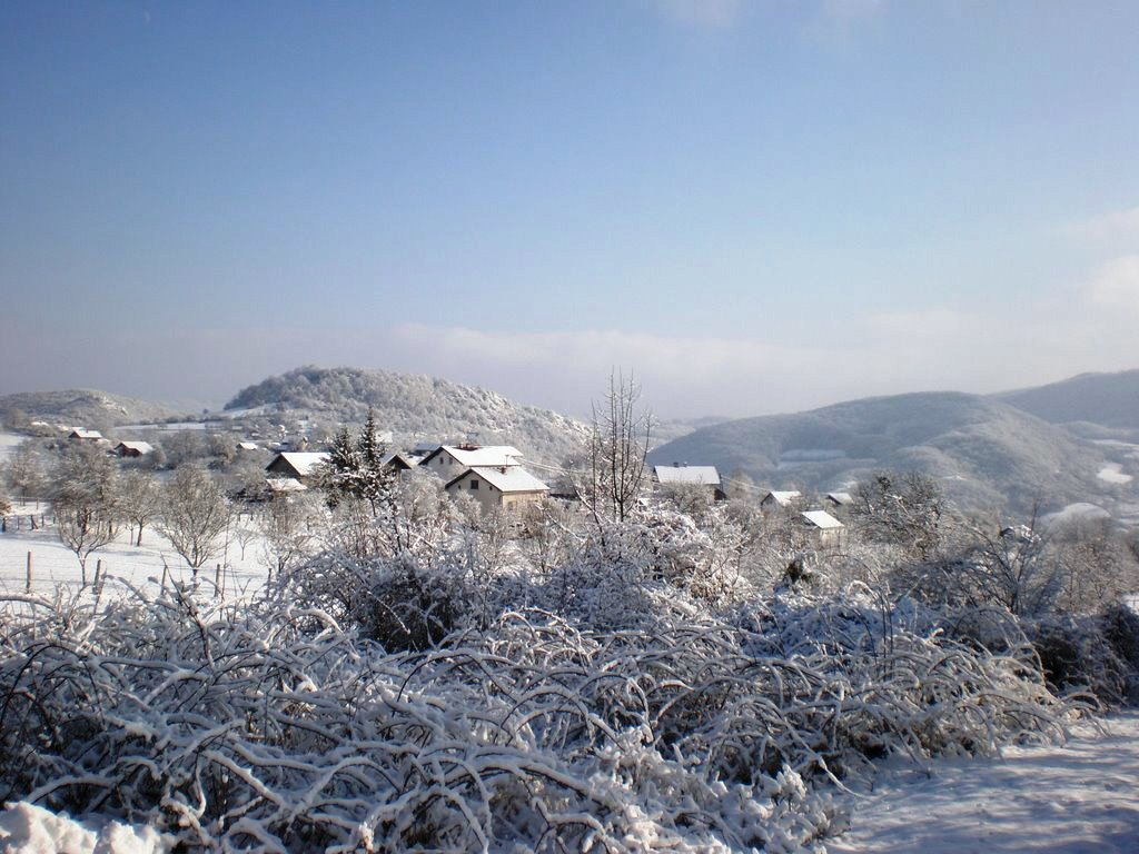 Selo Gustovara, opština Mrkonjić Grad.